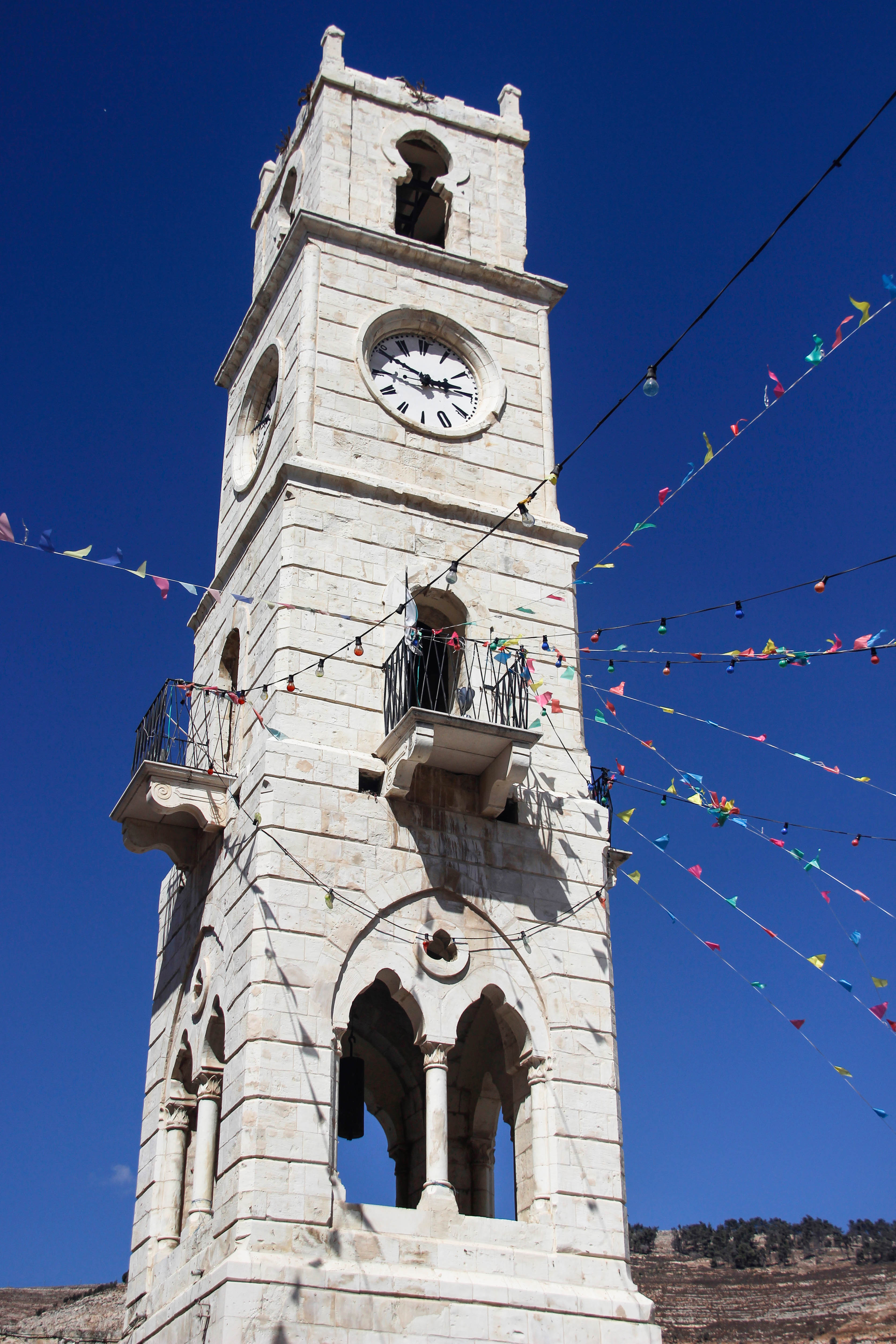 • بُرج ساعة نابلس. • تصوير: معتز توفيق اغبارية • 06.09.2014